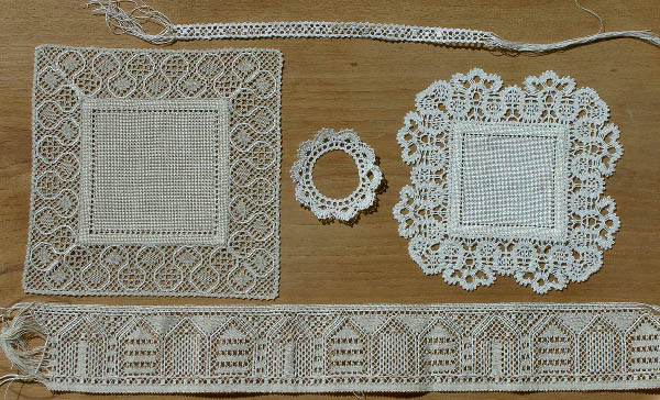 Några exempel på knypplade spetsar. Foto av: Mux 21 maj 2004 kl.19.04 (CEST)